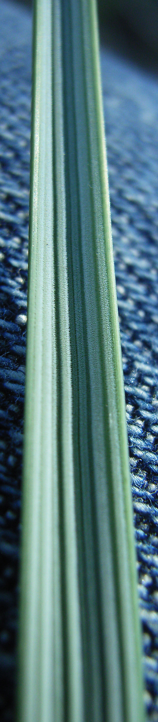 Rollblatt des Gewöhnlichen Strandhafers (Ammophila arenaria); Landkreis Rotenburg (Wümme), Niedersachsen